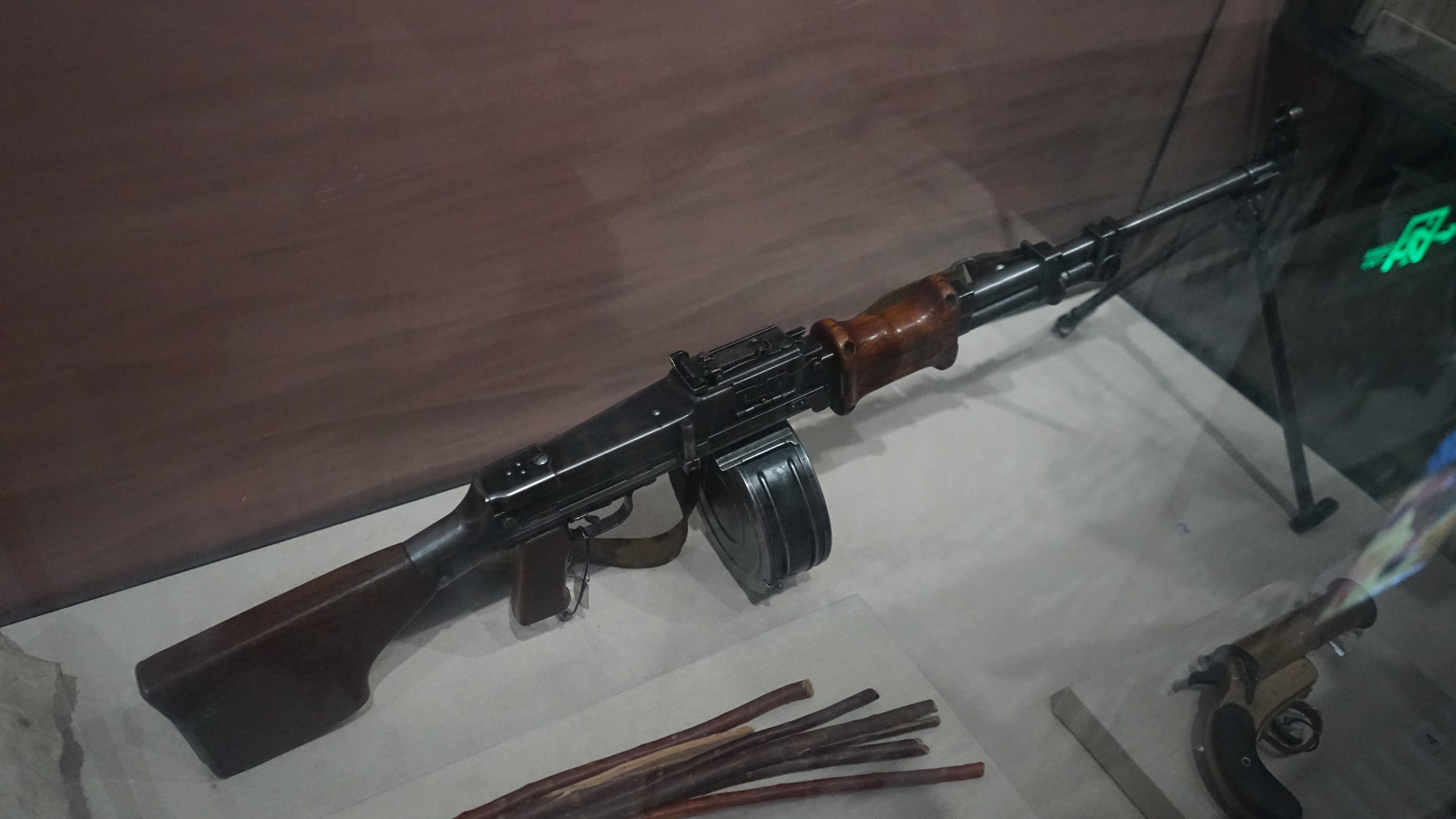 中文（中国大陆）: 中印边境自卫反击战荣立一等功的火力班使用的中国造1956年式7.62毫米轻机枪。一级文物。